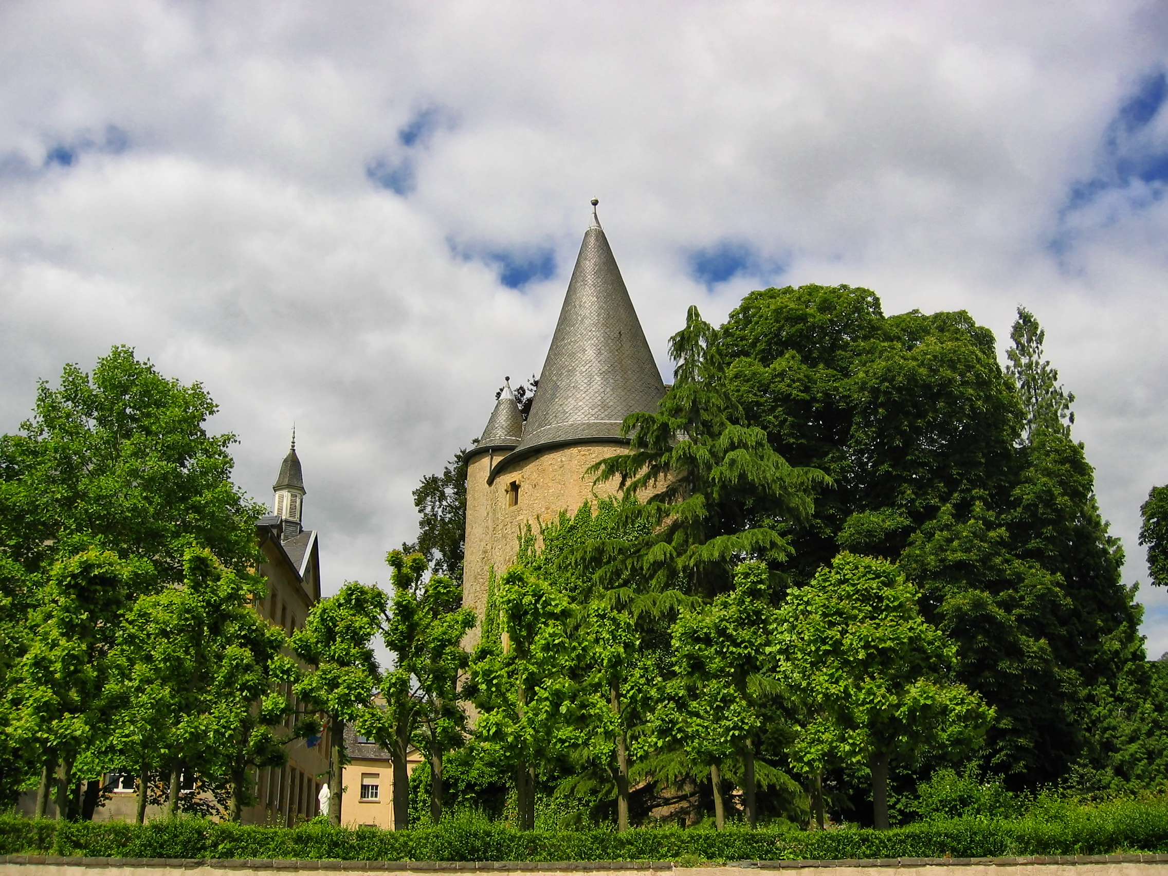 Wasserburg in Schengen